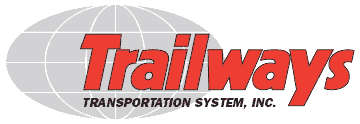 This is a logo for Trailways Transportation System.